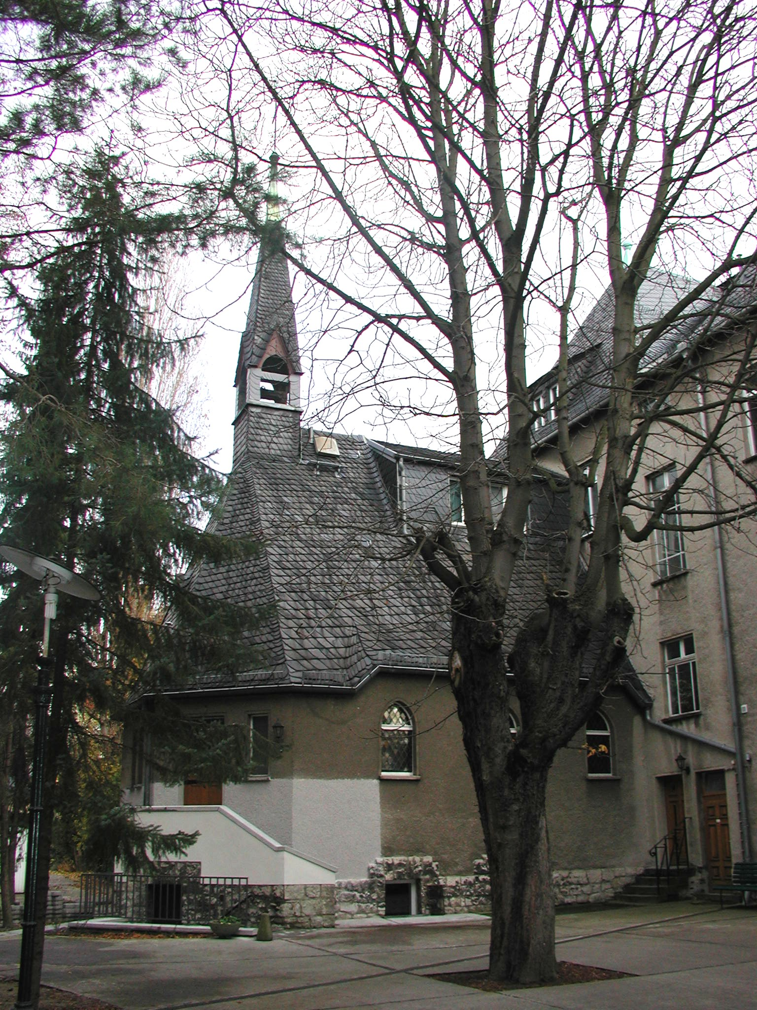 St. Marienkirche in Berlin-Karlshorst